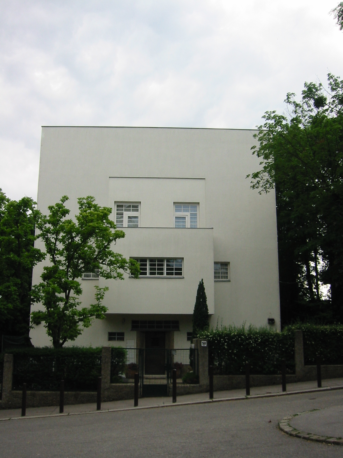 Villa/Landhaus, Haus Moller, heute Wohnhaus des Botschafters von Israel